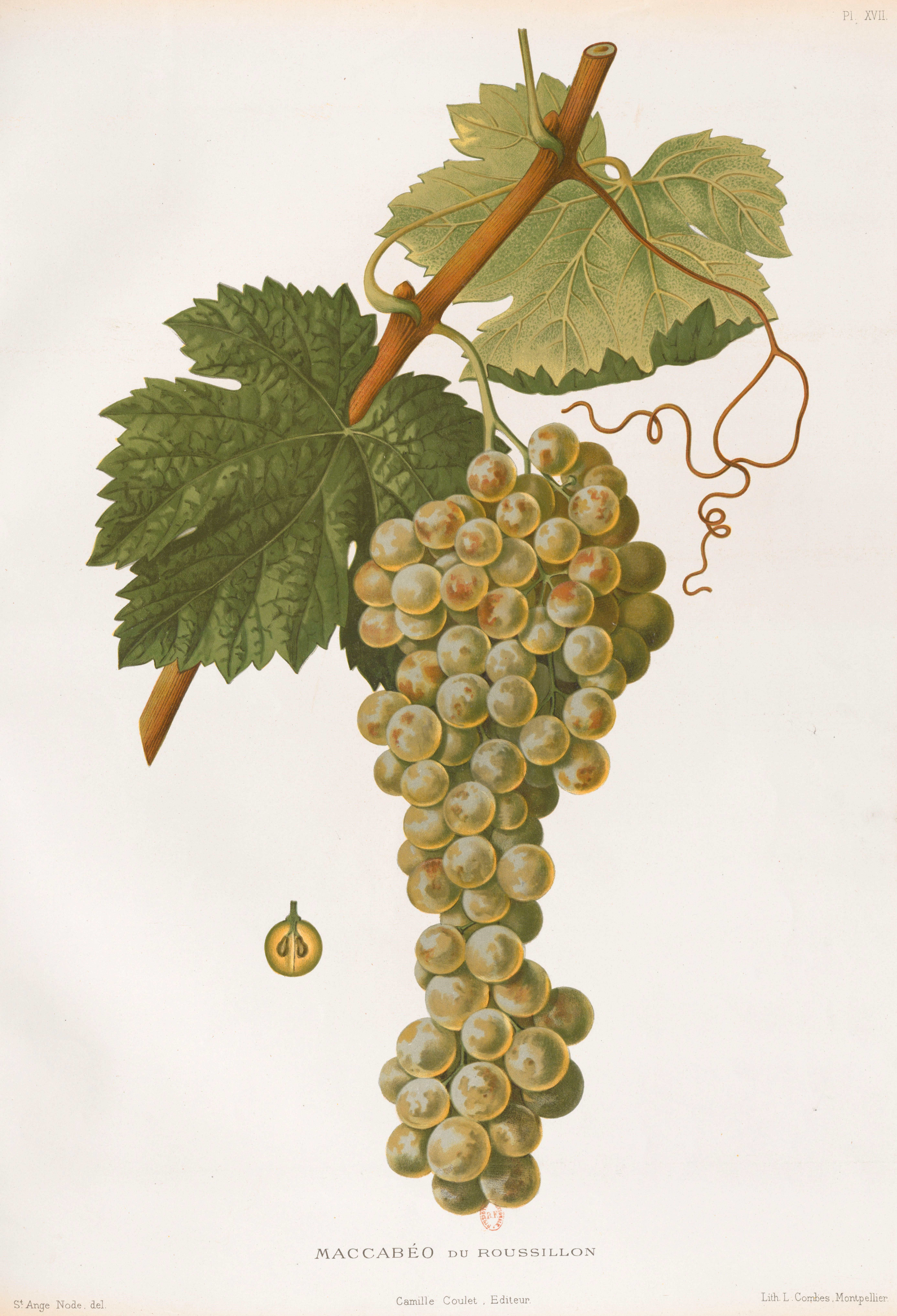 Lithographie du cépage Maccabéo